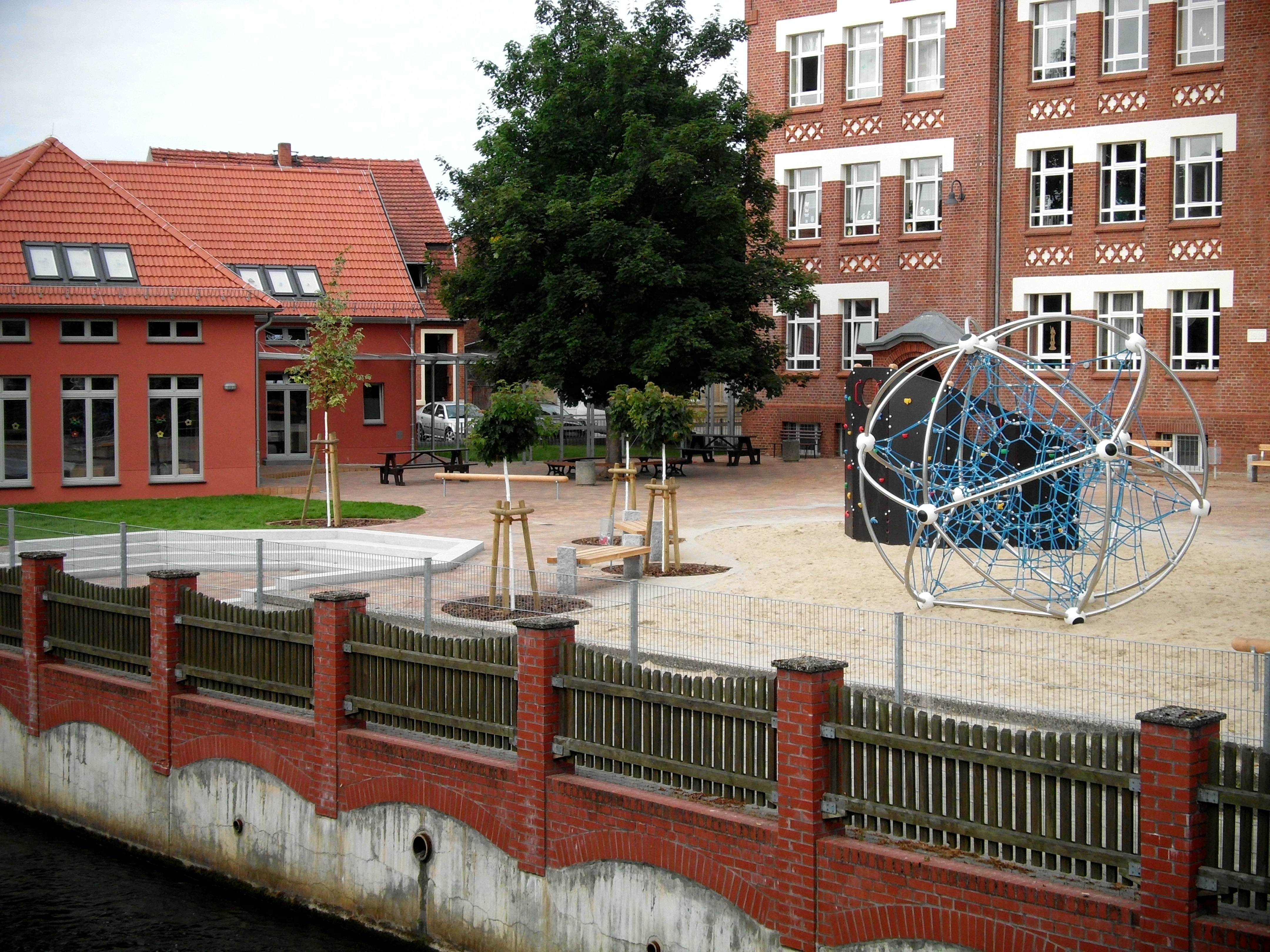 der neugestaltete Schulhof der Rolandschule in Perleberg